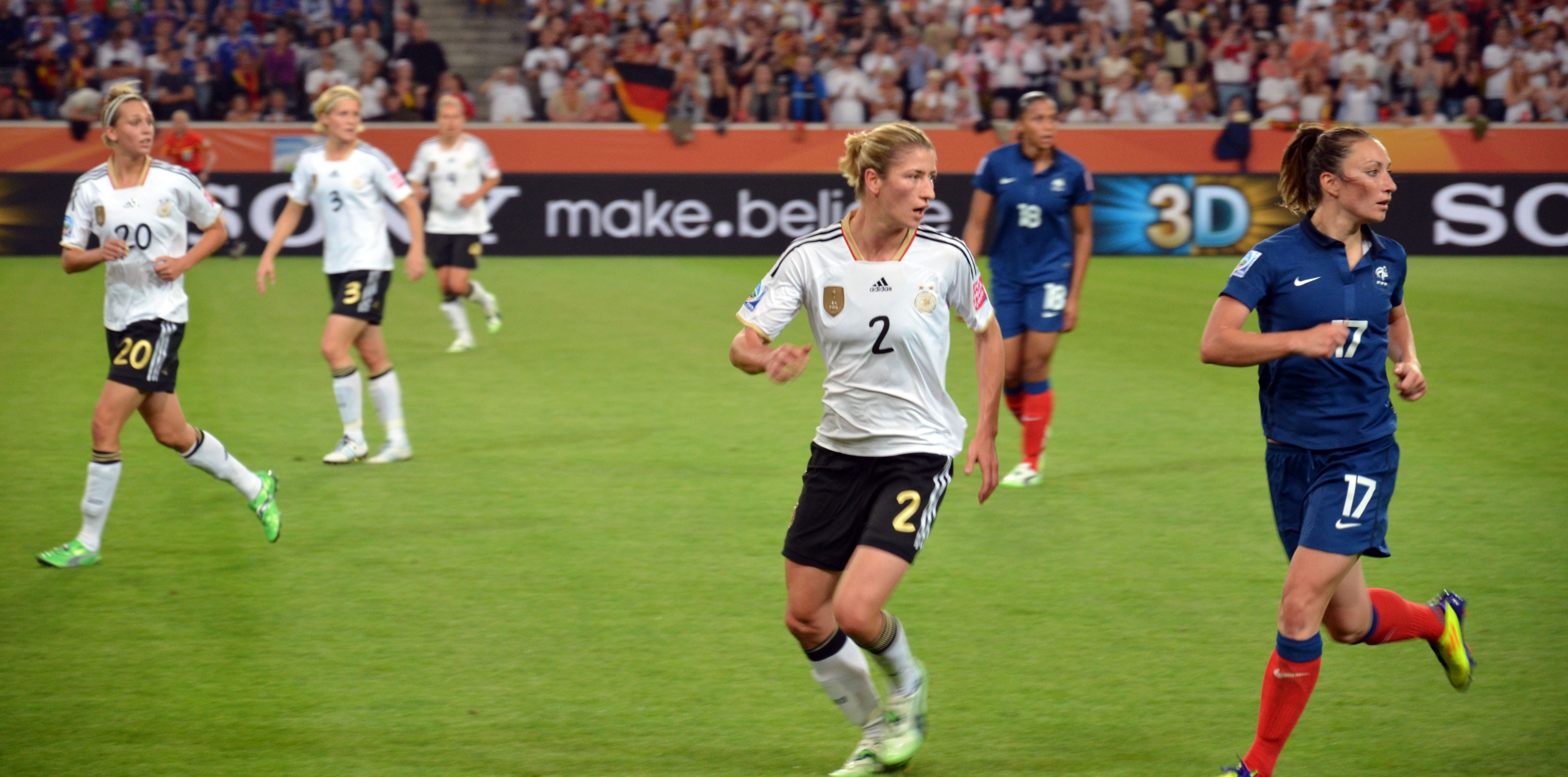 WM Vorrundenspiel zwischen Frankreich und Deutschland am 5. Juli 2011 im Borussiapark in Mönchengladbach Französinnen:Gaëtane Thiney (17) und Marie-Laure Delie (18) Deutsche: Bianca Schmidt (2), Babett Peter (4), Saskia Bartusiak (3), Lena Goeßling (20)